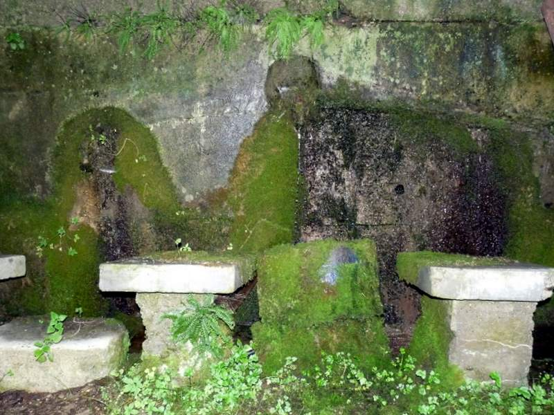 Izvir v Podlajšču pod Avčami, kamor so nekdaj v sušnih mesecih hodili po vodo in kjer so ženske izplakovale perilo, ki so ga prej doma prekuhale (podatek Dragana Božiča v e-pošti 25. 8. 2010).